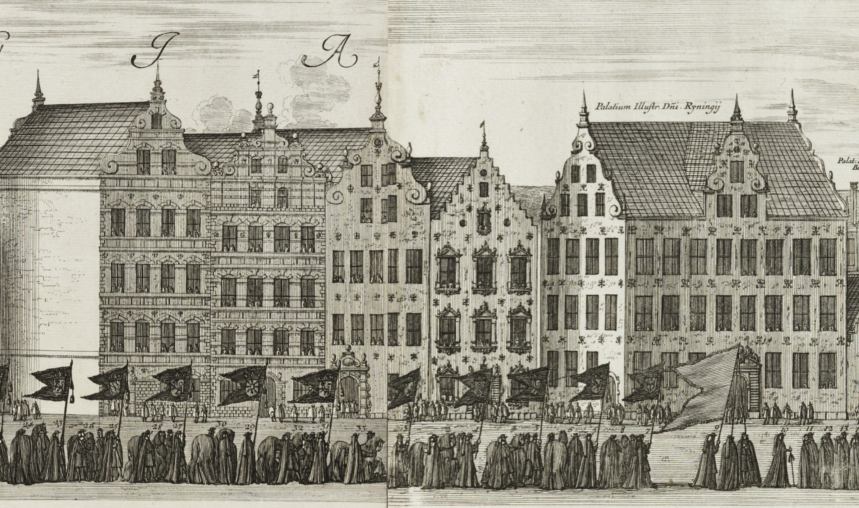 Del av Kopparstick med motiv från Karl X Gustavs begravningståg den 4 november 1660, graverat av Jean Le Pautre efter teckning av Erik Dahlbergh, visande kvarteren Milon (vänster) och Atomera.